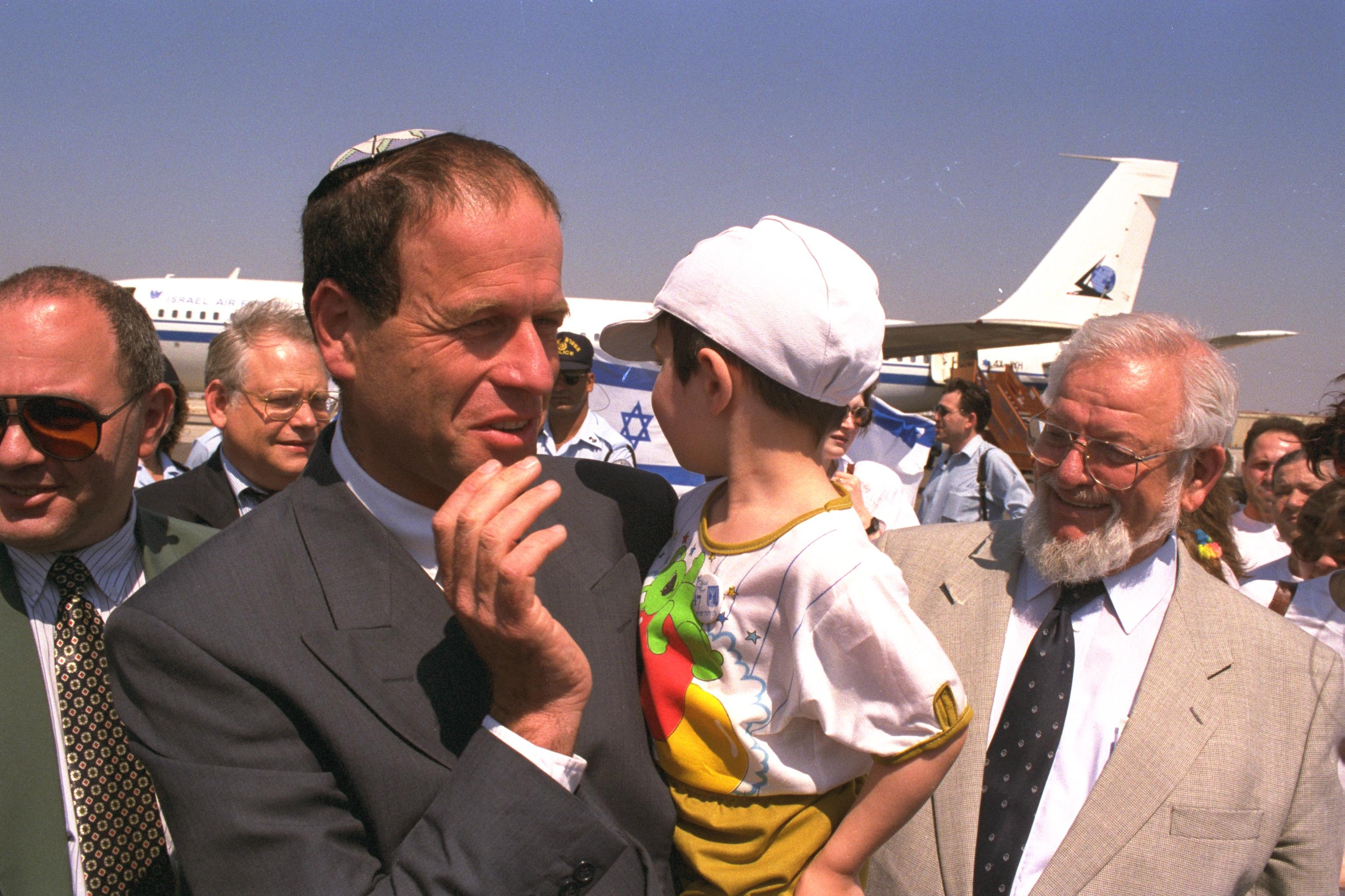 (Right to left) Absorption Minister Yair Tzaban and Jewish Agency Chairman Avraham Burg greet new Russian immigrants upon their arrival at Ben-Gurion Airport. מימין שר הקליטה יאיר צבן ויור הסוכנות היהודית אברהם בורג, מקבלים פני עולים חדשים מרוסיה בשדה התעופה בן גוריון.